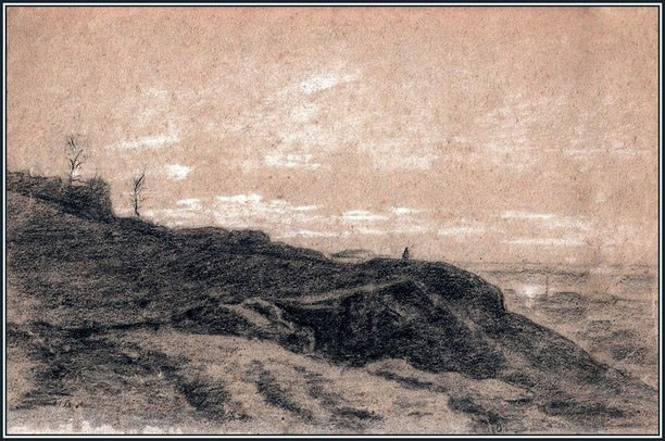 Альфред Декаен, "Остров Святой Елены"